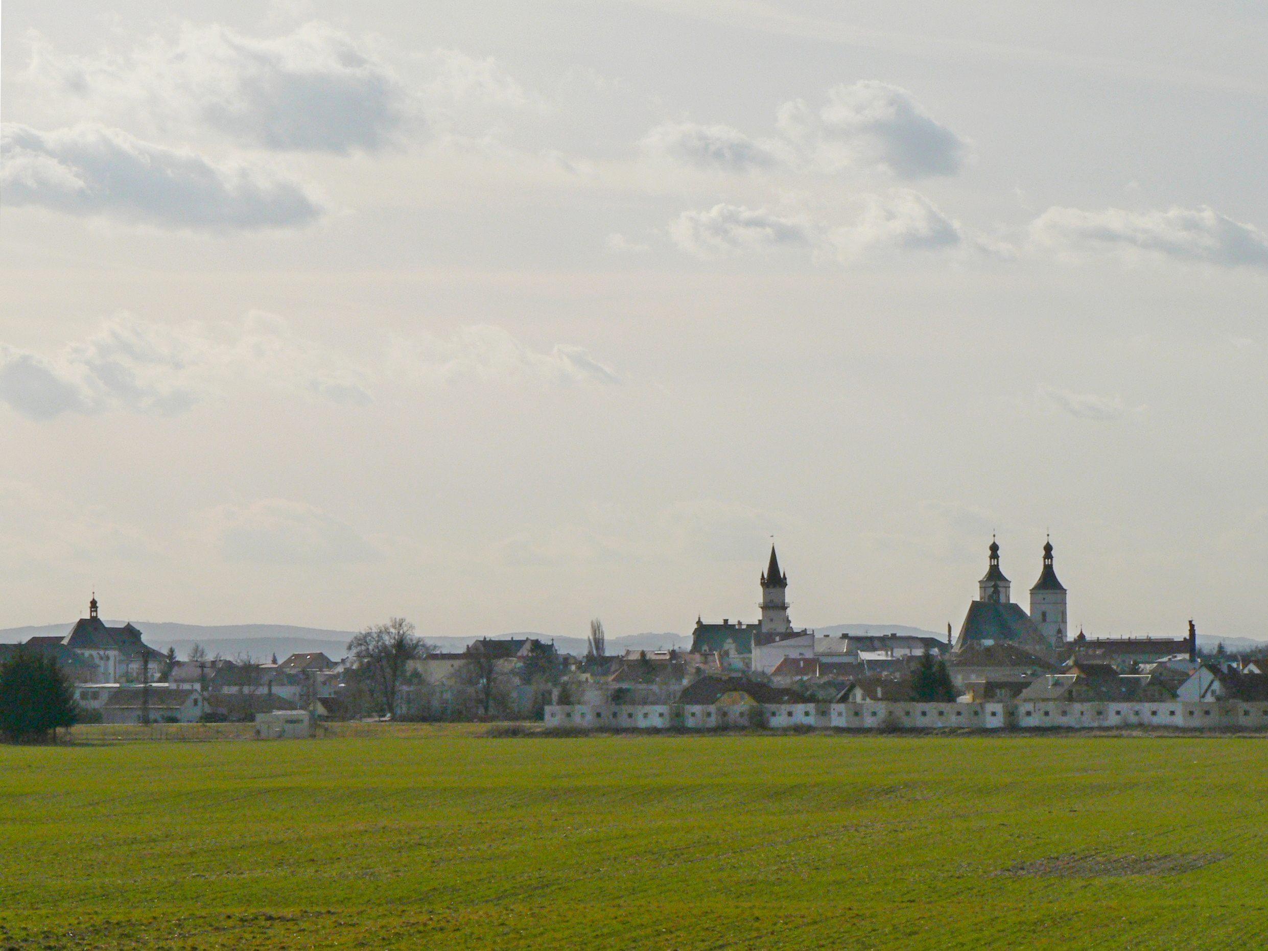 Uničov, silueta města od východu